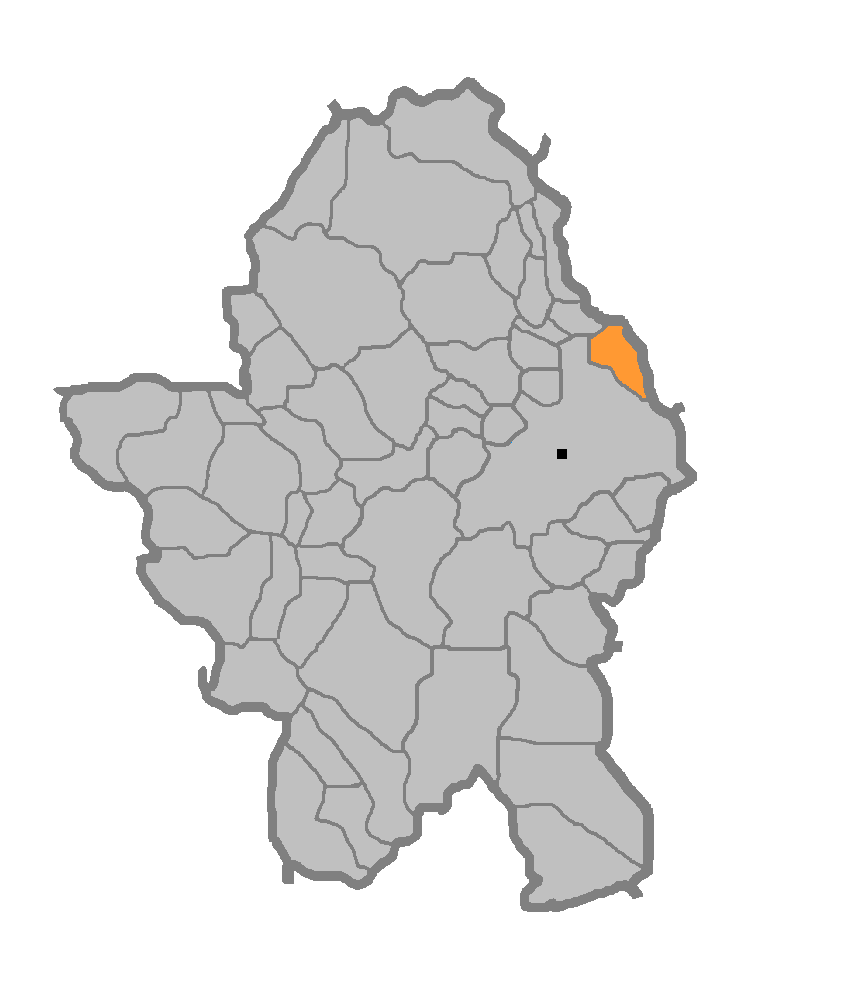 Мјесна заједница Пријечани